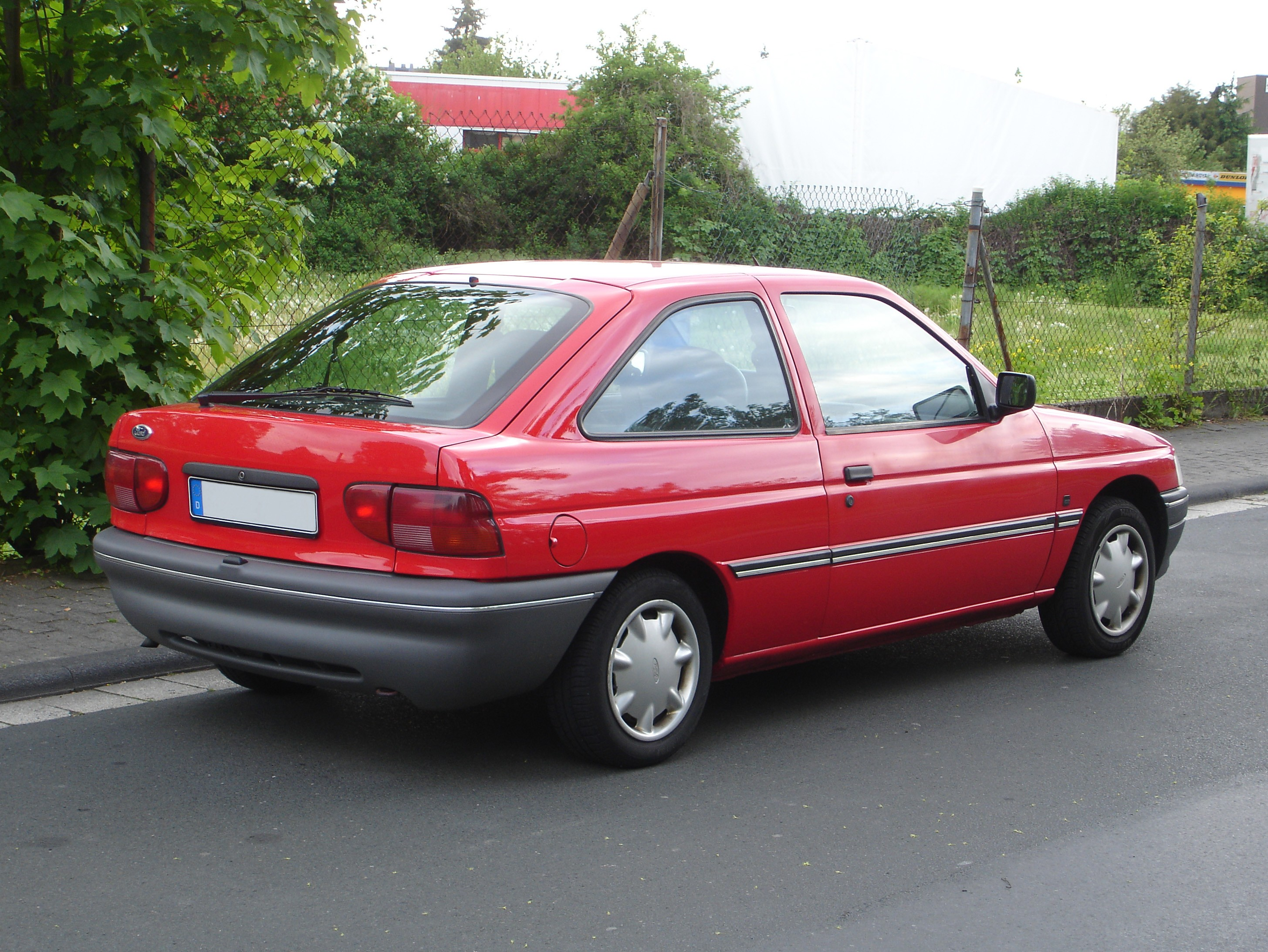 Ford Escort Limousine 2-türig Modell 1993 Heckansicht